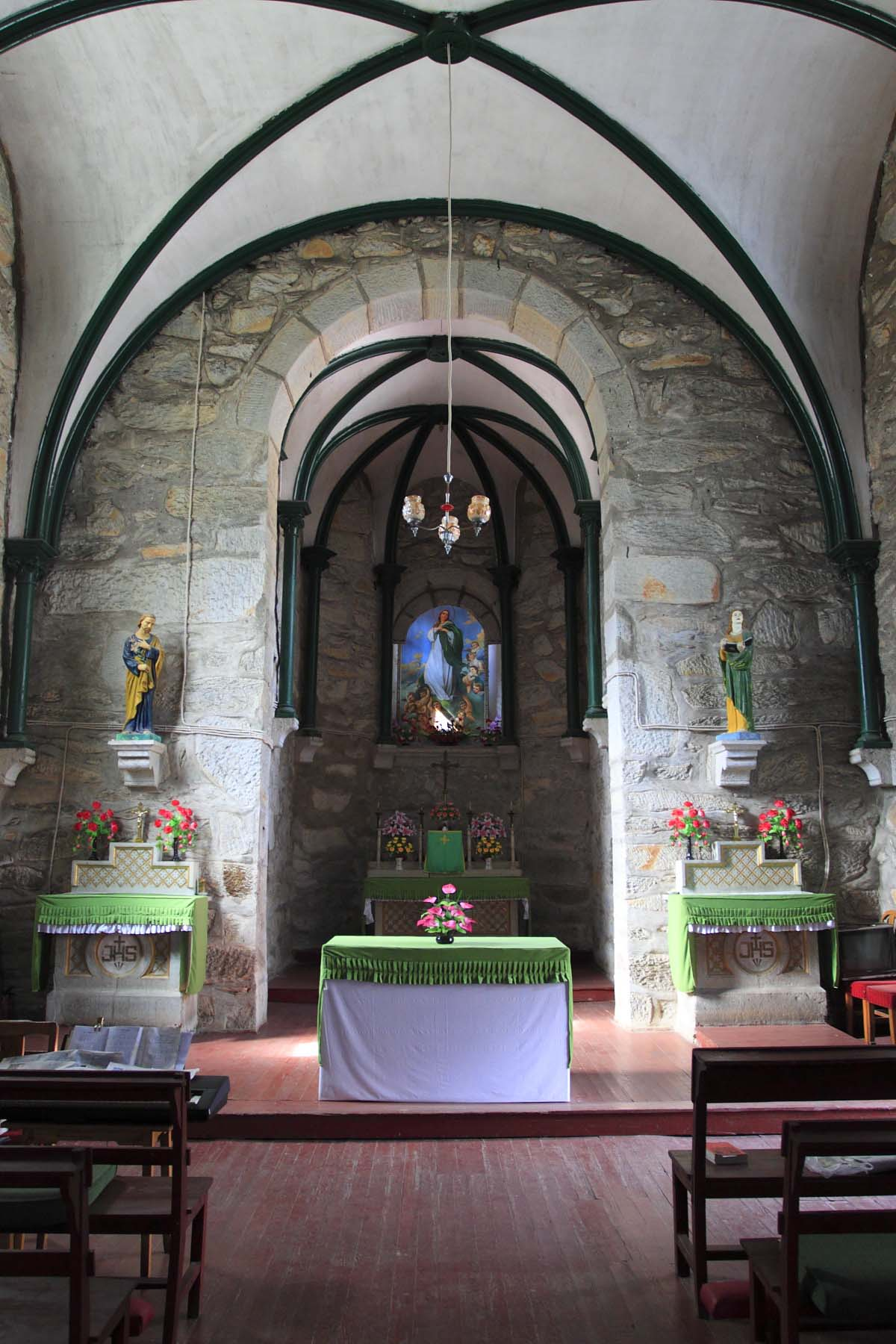 江西庐山天主堂，九江市文物保护单位